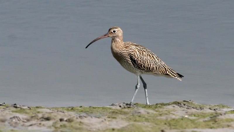 Curlew (Numenius arquata)